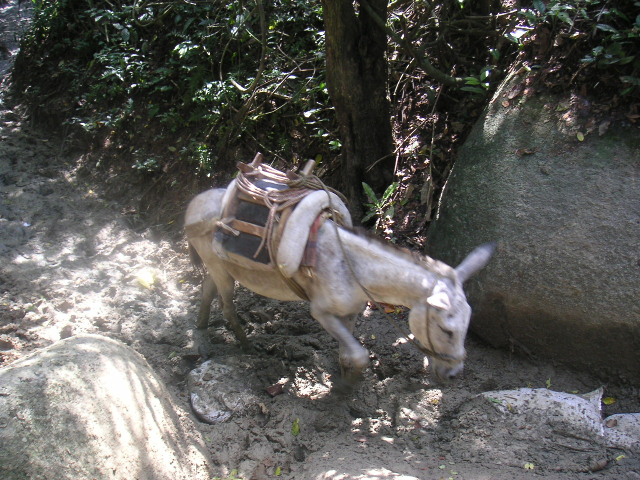 Chemin muletier entre Santa Marta et le parc Tayrona. Le chemin peut être très boueux par temps de pluie.